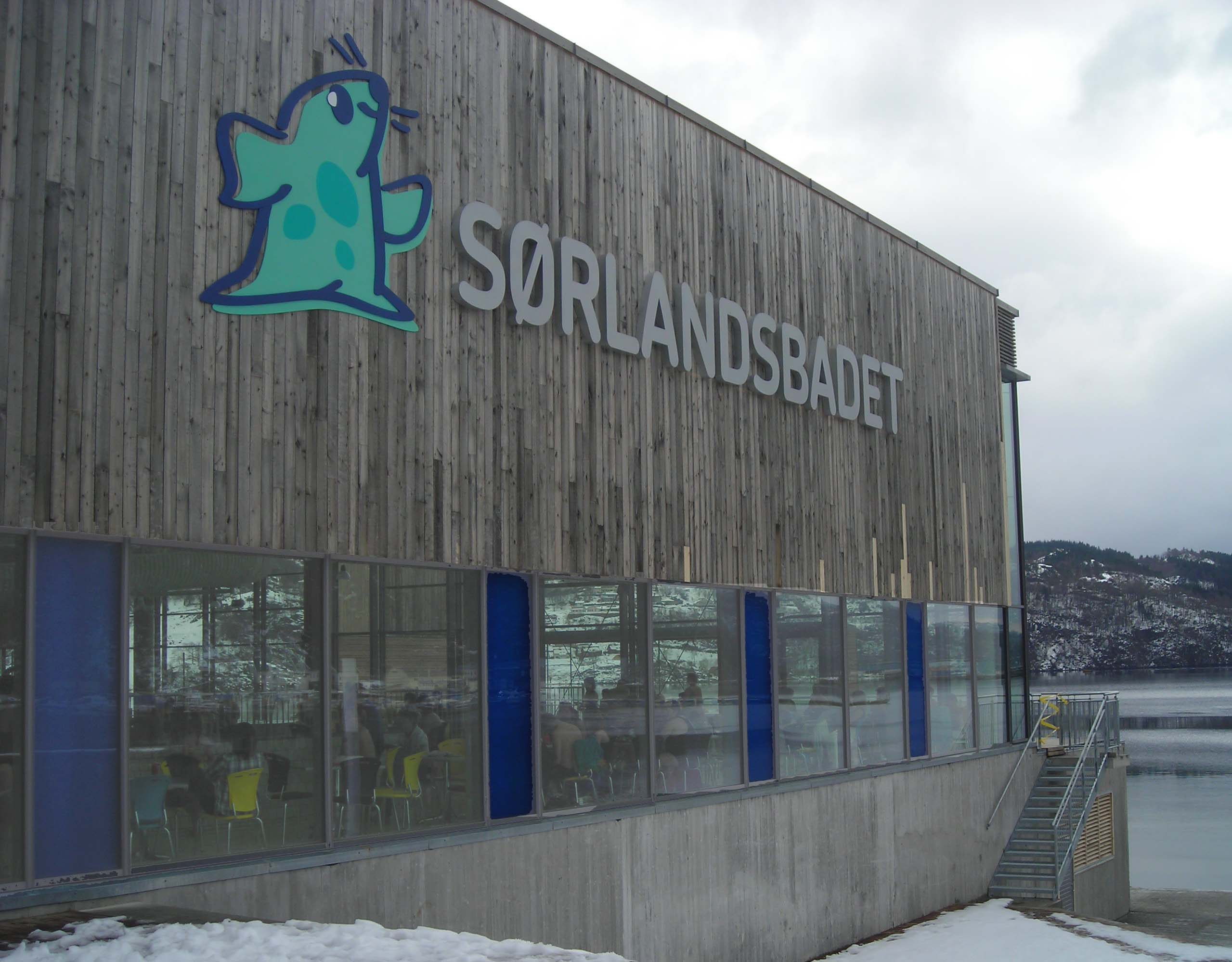 Sørlandsbadet in Lyngdal, Norway